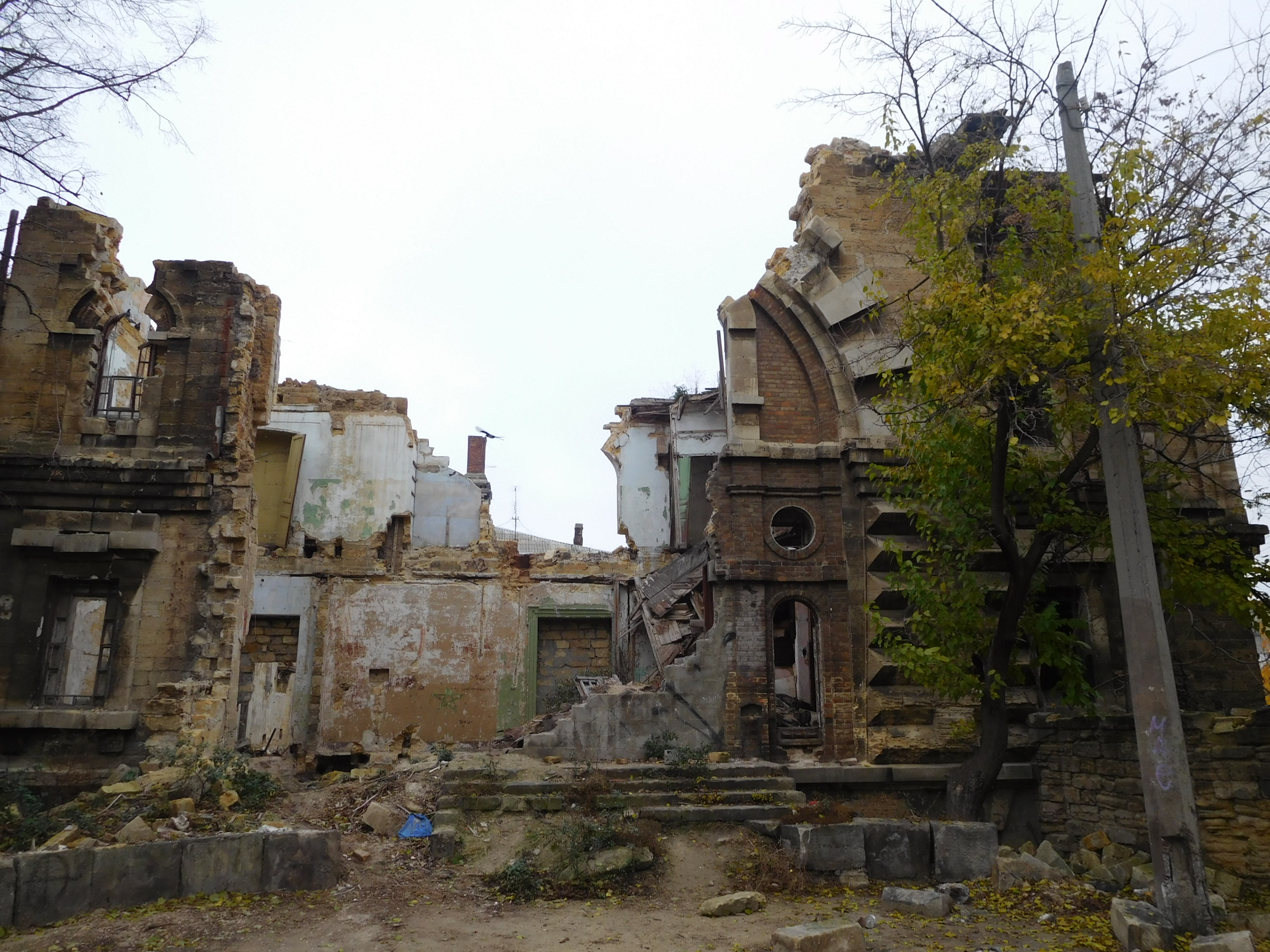 Комплекс будівель Одеського відділення Російського технічного товариства. Будівля Одеського відділення Російського технічного товариства ,в якому: - на IV з'їзді залізничних електротехніків Росії з доповіддю виступив О.С. Попов - російський фізик-винахідник радіо; - містився перший в світі інститут радіології під керівництвом Є.С. Буксера, Одеса, Князівська вул., 1а / Новосельського вул.